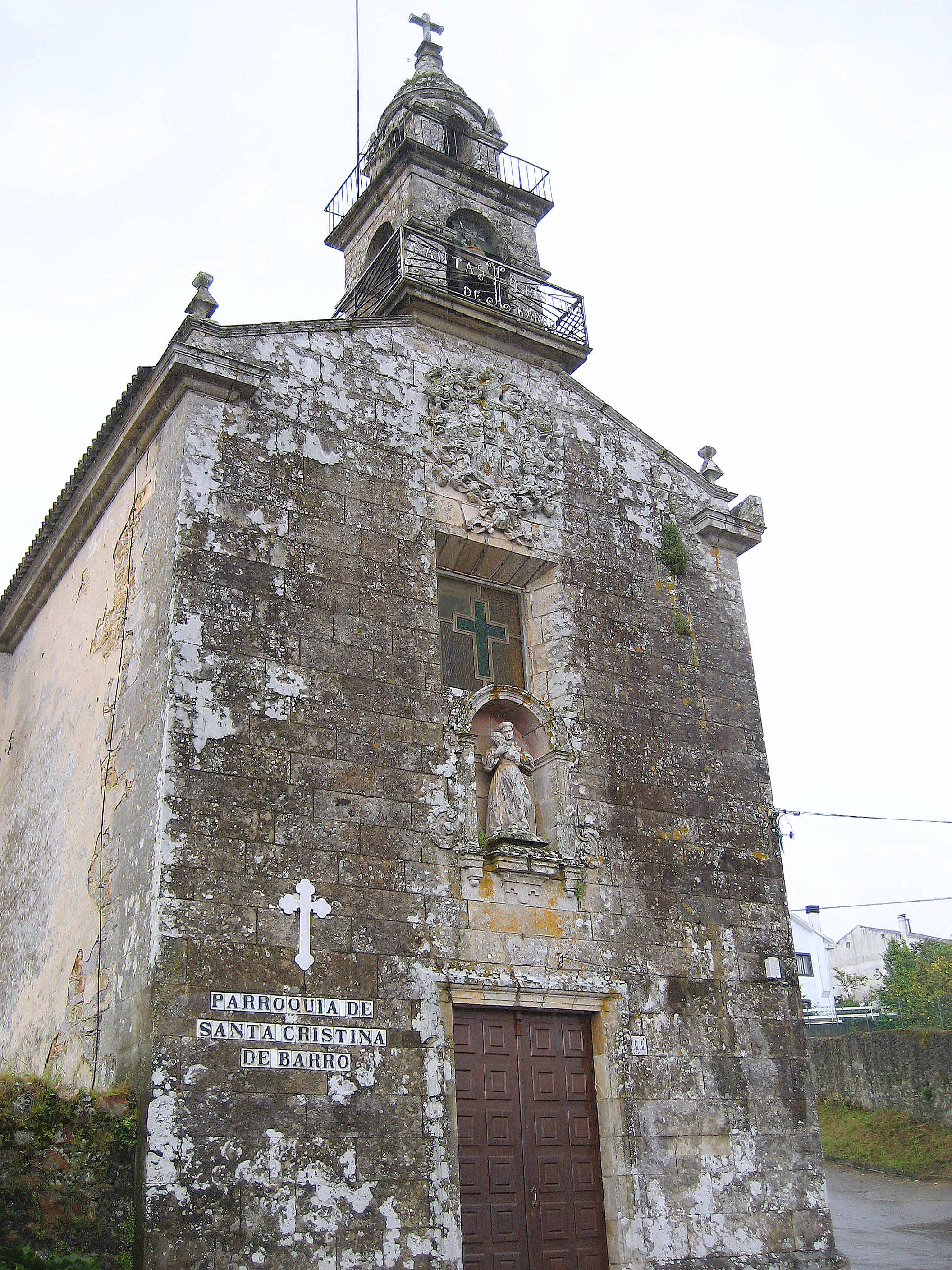 Santa Cristina de Barro, Noia